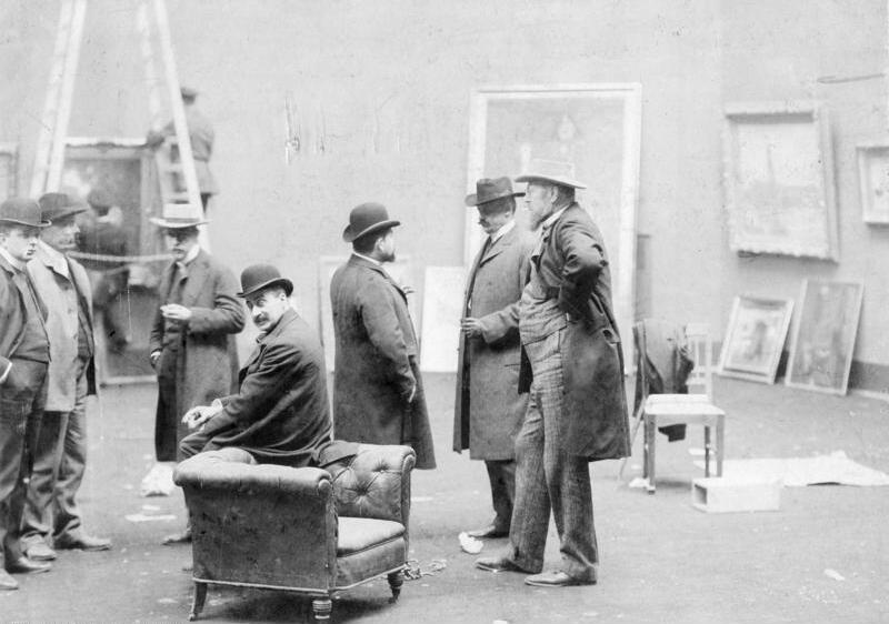 ADN/ZB-Archiv Berlin 1905: Die Vorbereitung der Ausstellung der Berliner Sezession. Die Jury bei der Arbeit. v.l.n.r. Paul Cassirer, Lovis Corinth, Fritz Klimsch, Max Liebermann, Max Slevogt, Hermann Hirzel, Graf Leopold von Kalckreuth.